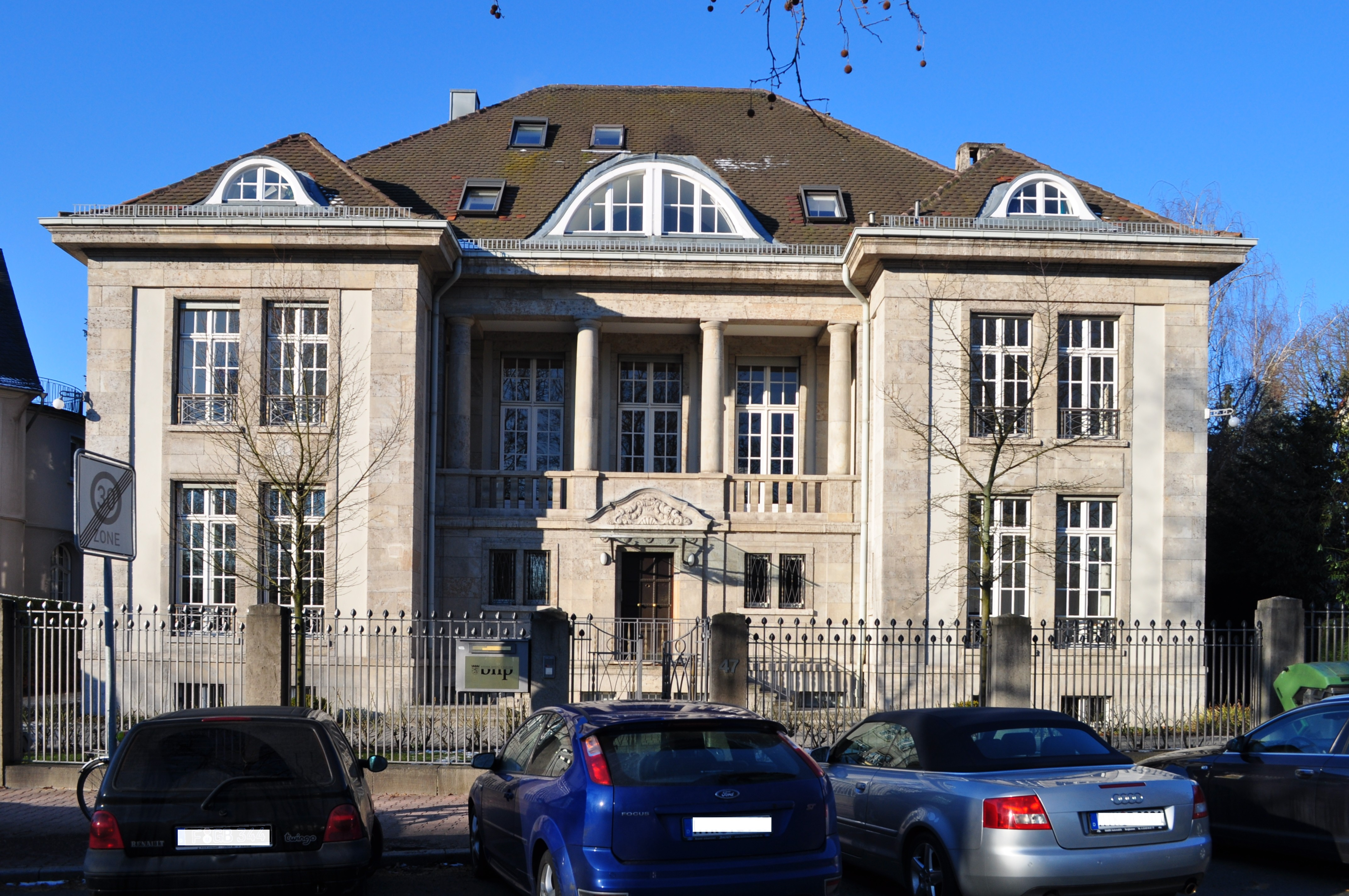 Denkmalgeschützte neoklassizistische Villa Zeppelinallee 47 in Frankfurt am Main von 1910, Architekt B. Paul